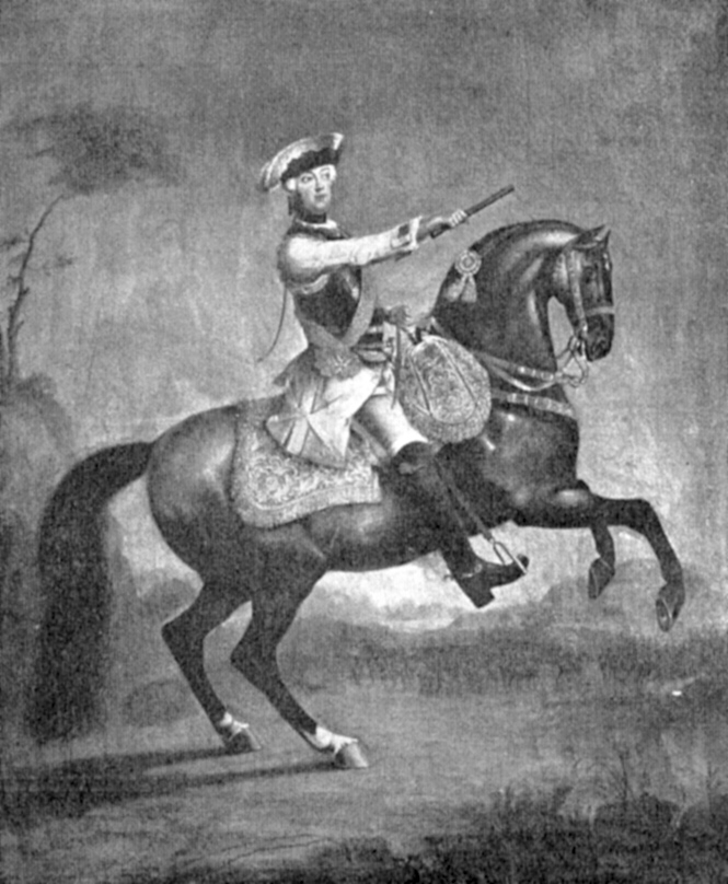 Seite 6, Abbildung 6, Untertitel: Markgraf Georg Wilhelm als kais. Generalwachtmeister in der Uniform des fränkischen Kürassierregiments. Sammlungen des hist. Vereins von Oberfranken.